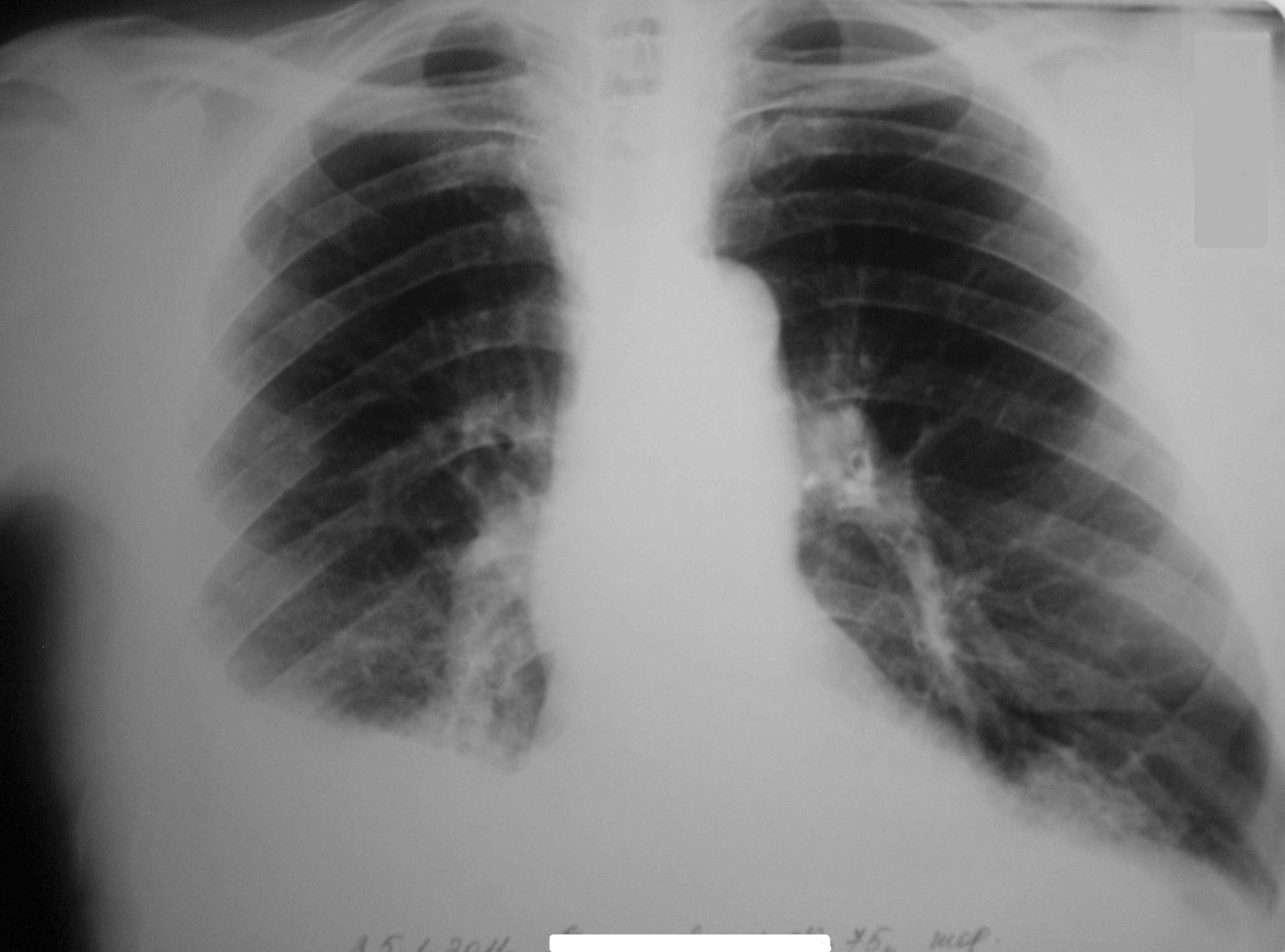 Закрытые переломы VI, VII, VIII, IX рёбер справа. Правосторонний гемоторакс.